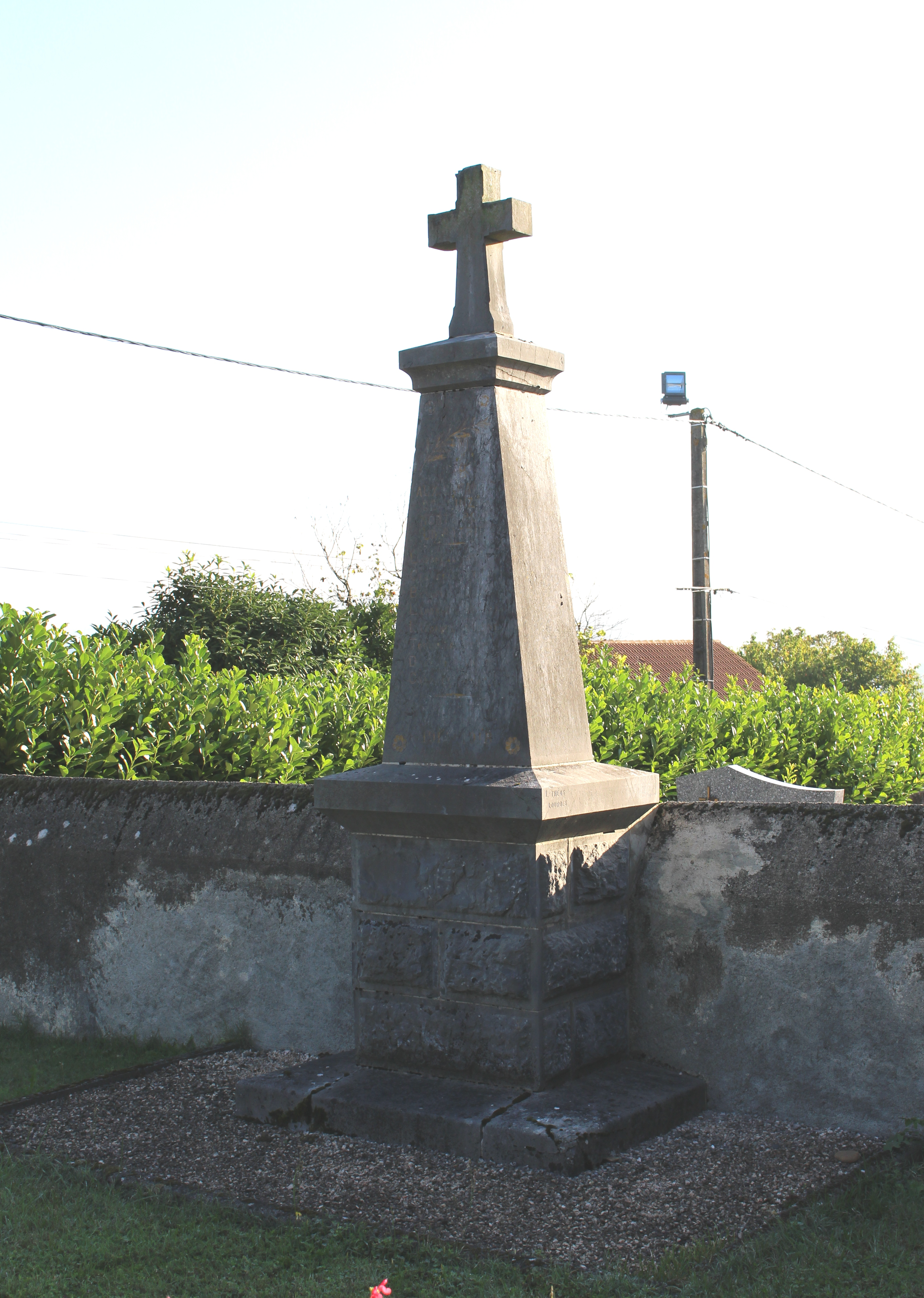 Monument aux morts de Sinzos (Hautes-Pyrénées)